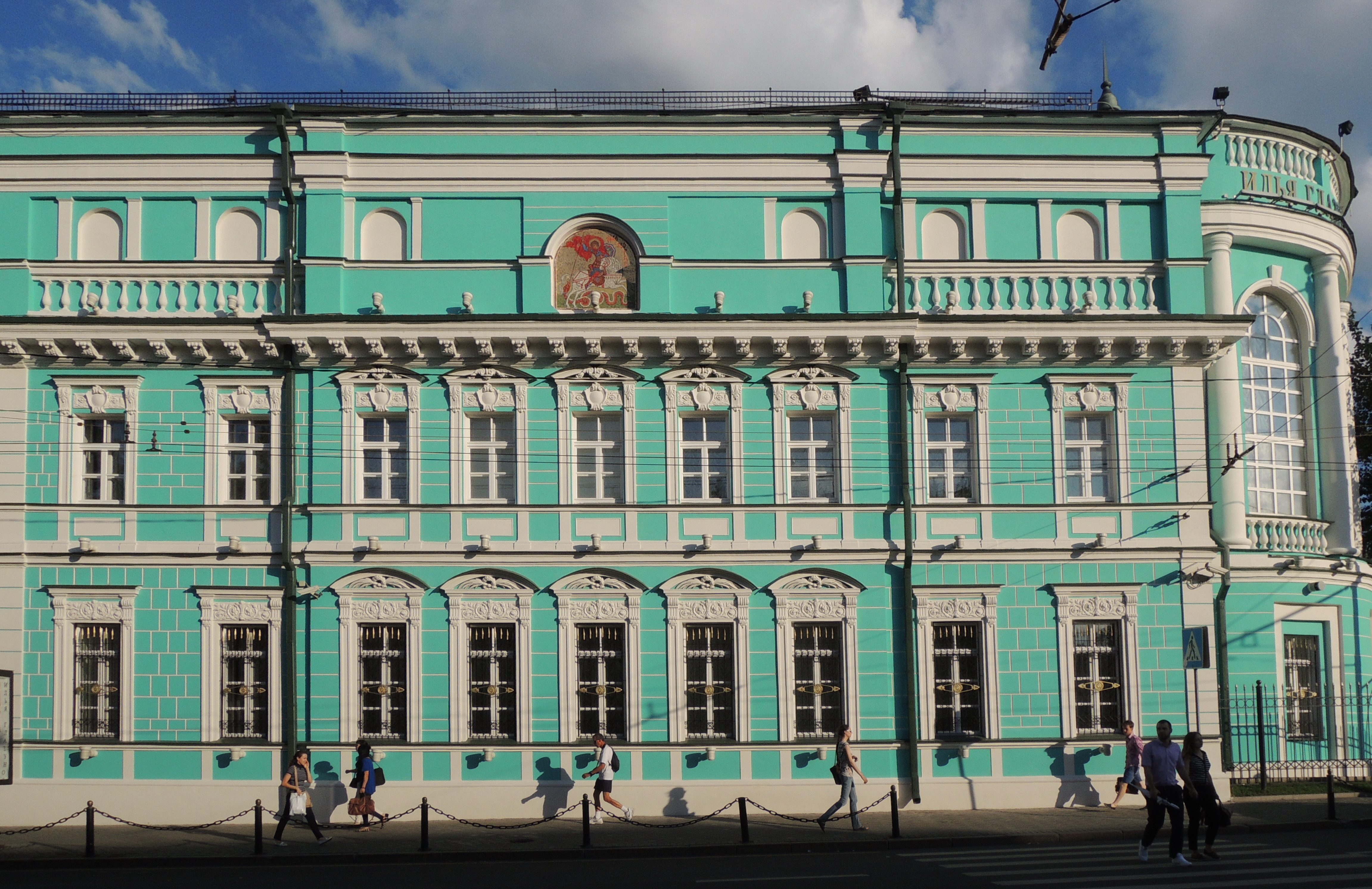 Москва, Россия. Улица Волхонка. Картинная галерея Ильи Глазунова.